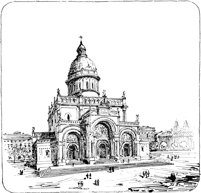 Sobór na Placu Saskim, projekt przebudowy wg. Stefana Szyllera